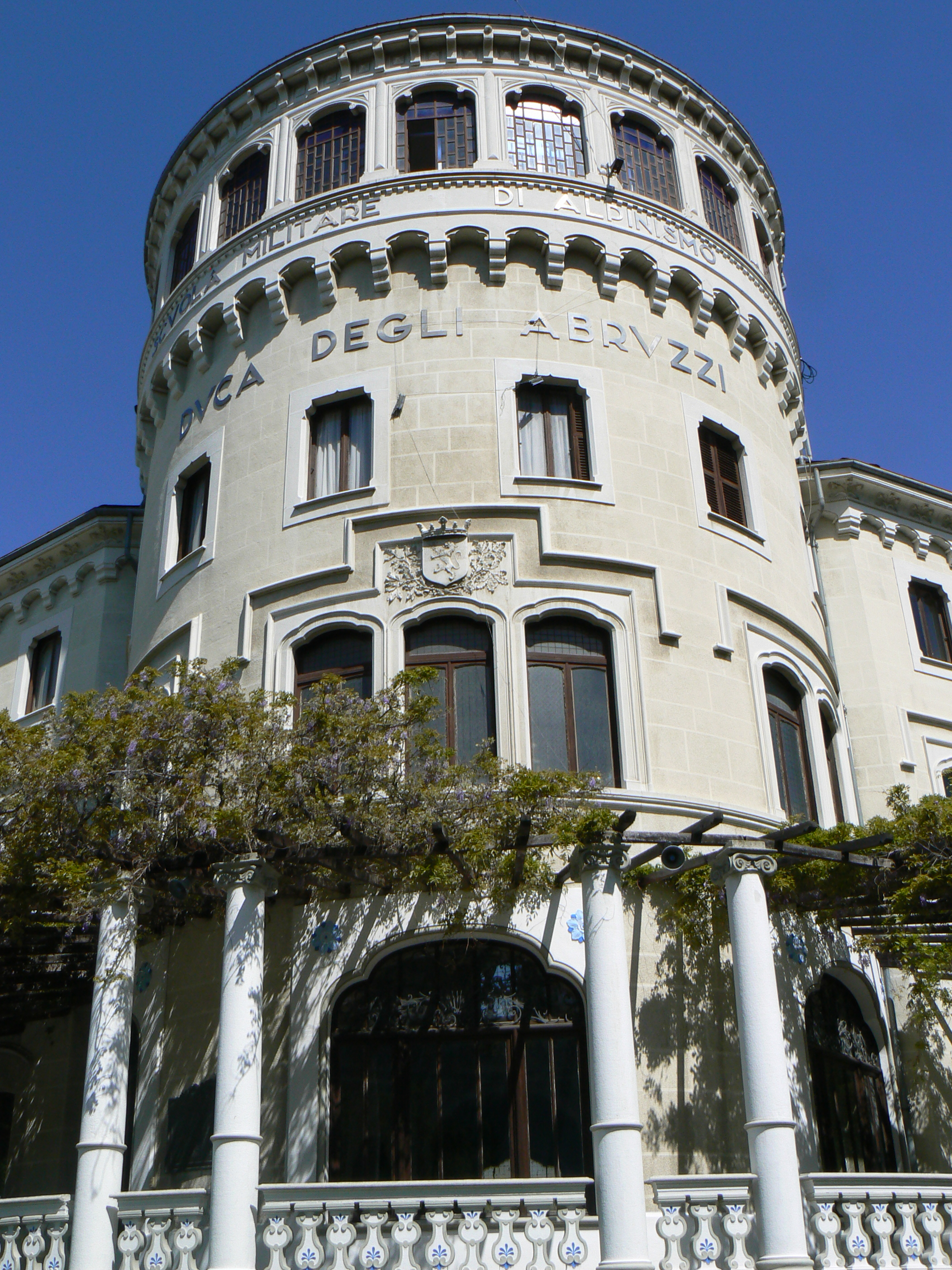 facciata Castello Jocteau, Aosta, Valle d'Aosta, Italia.